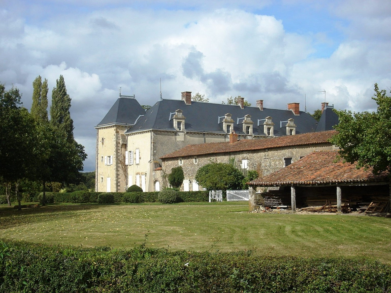 Château du Plessis-le-Franc